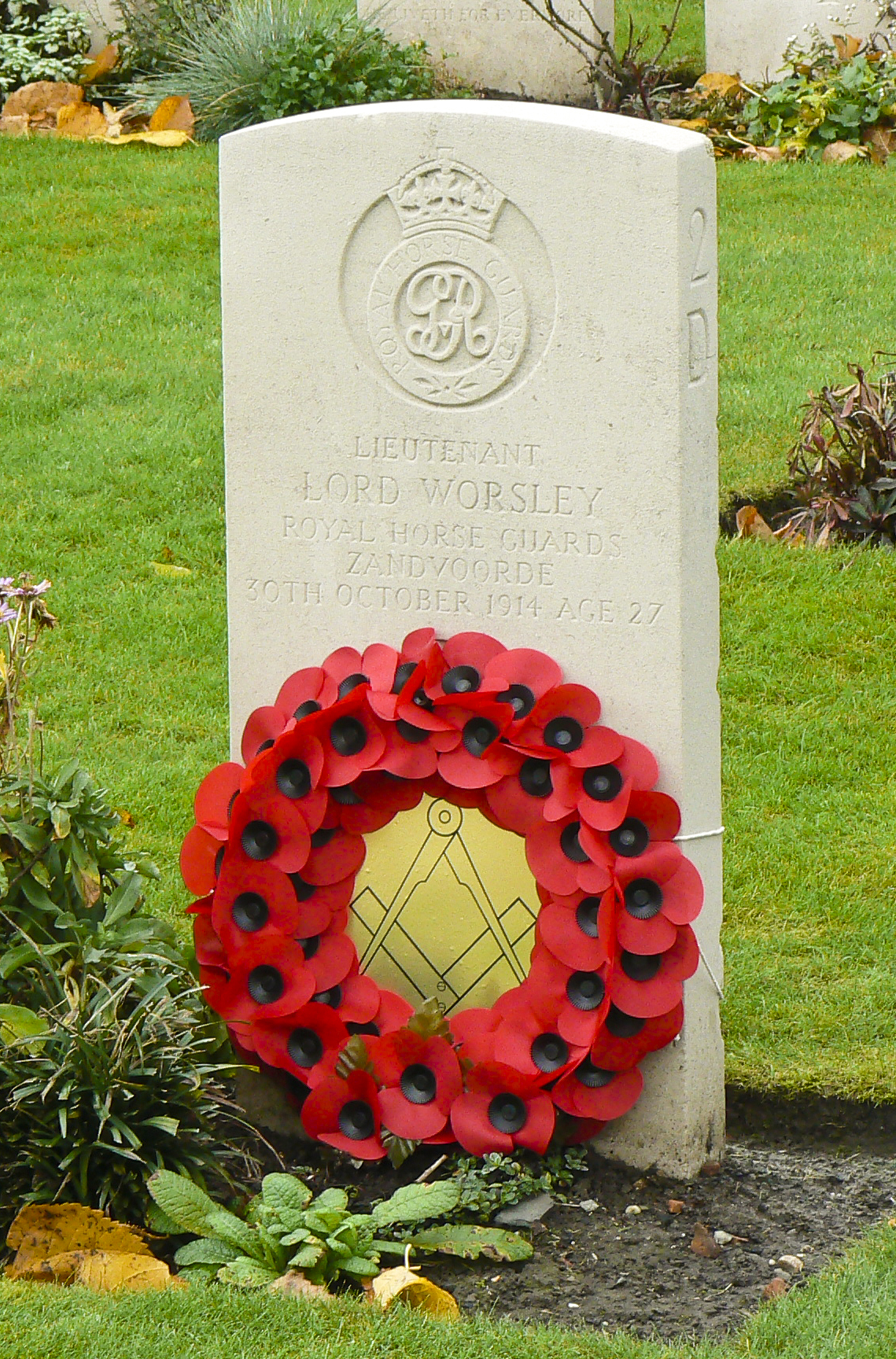 Graf van Lord Worsley